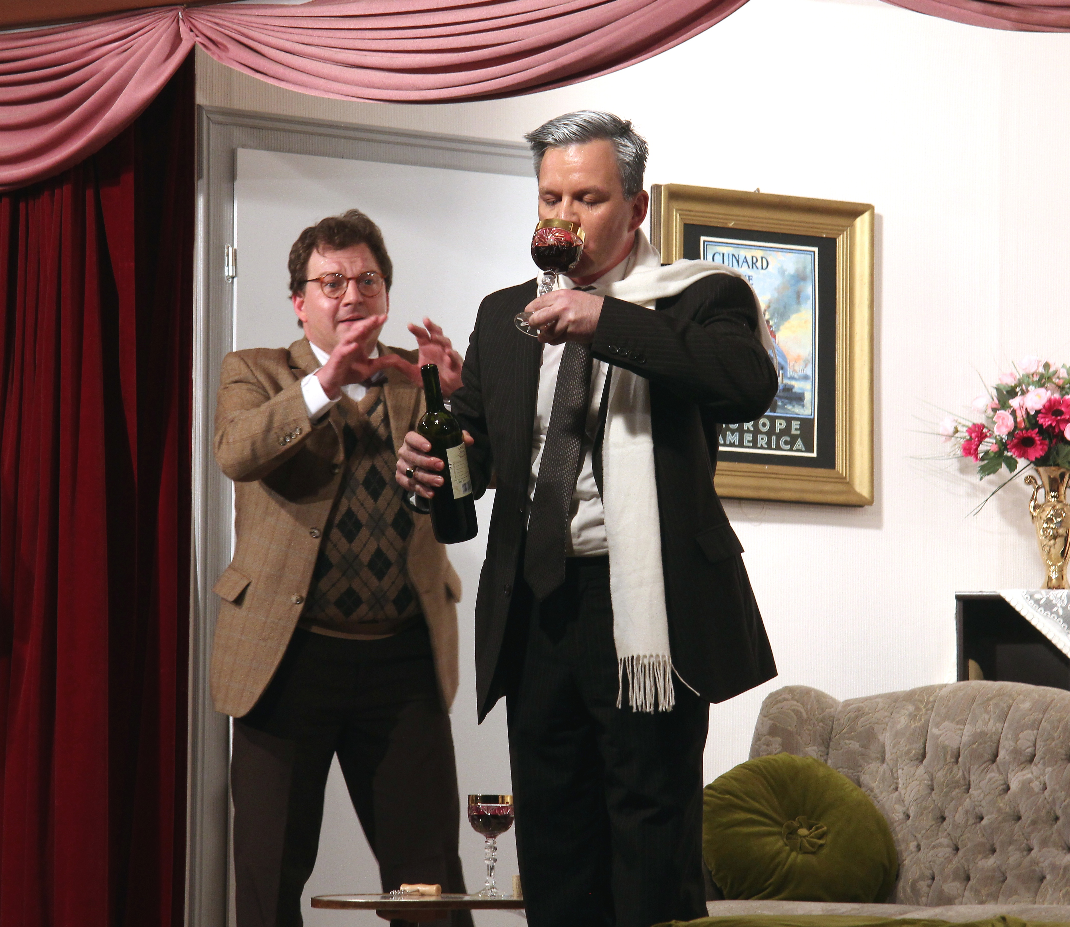 Merelli (Ingo Rutschmann) nimmt den Schlaftrunk, den Max (Michael Müller) zubereitet hat. Aufführung der Kolping-Theatergruppe Kärlich in Mulheim-Kärlich. Die Gruppe wurde 1978 aus der Jugendarbeit der Kolpingsfamilie St. Mauritius Kärlich heraus gegründet und spielt seit 1984 regelmäßig ab Ostern 14 bis 18 Mal. „Otello darf nicht platzen“ wurde 2012 16 Mal aufgeführt.